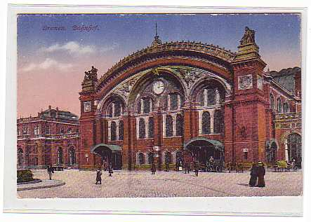 Old images